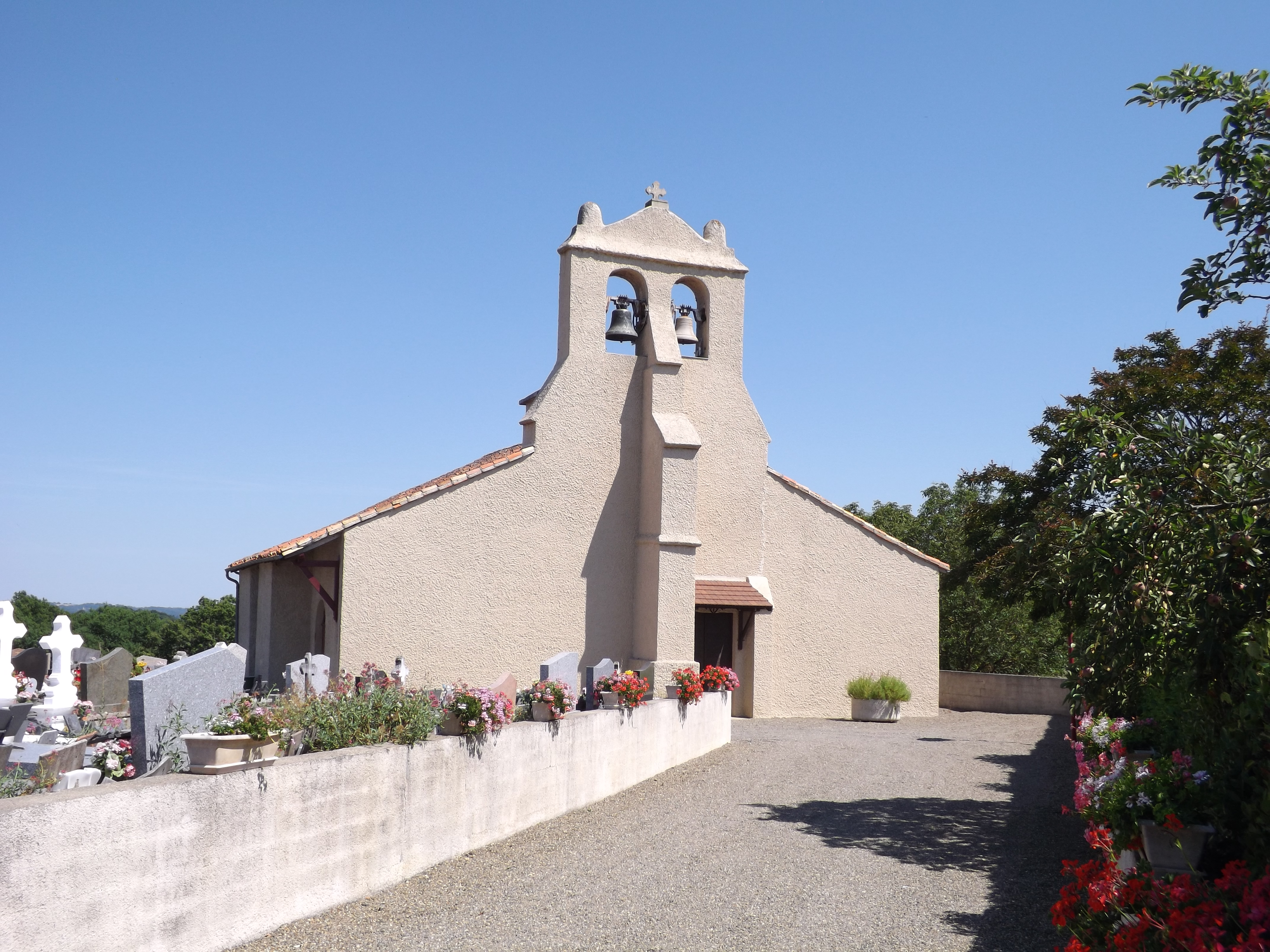 Glèisa de sent Estève de Hilhondé, Tursan, Gasconha